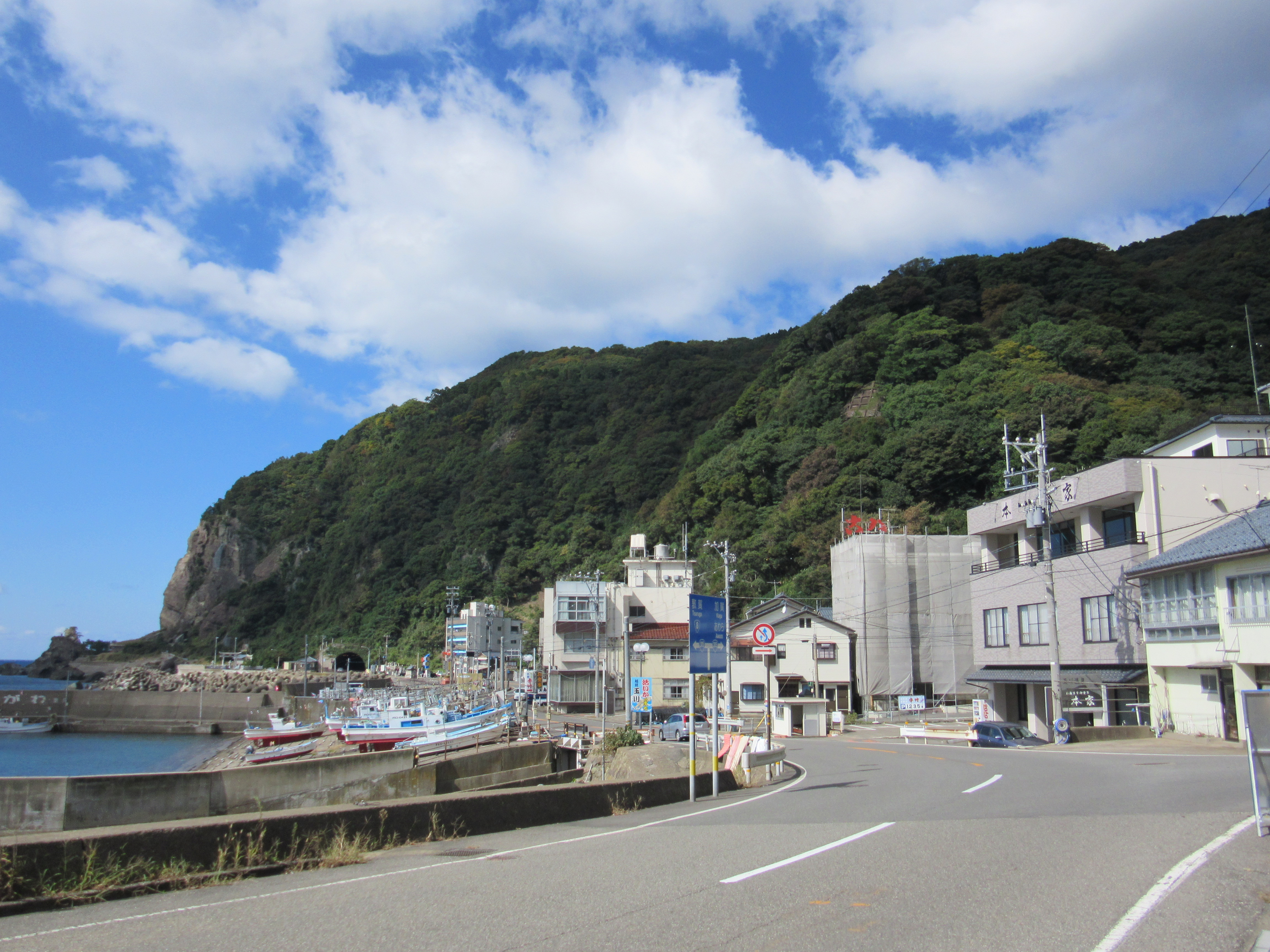 越前玉川温泉